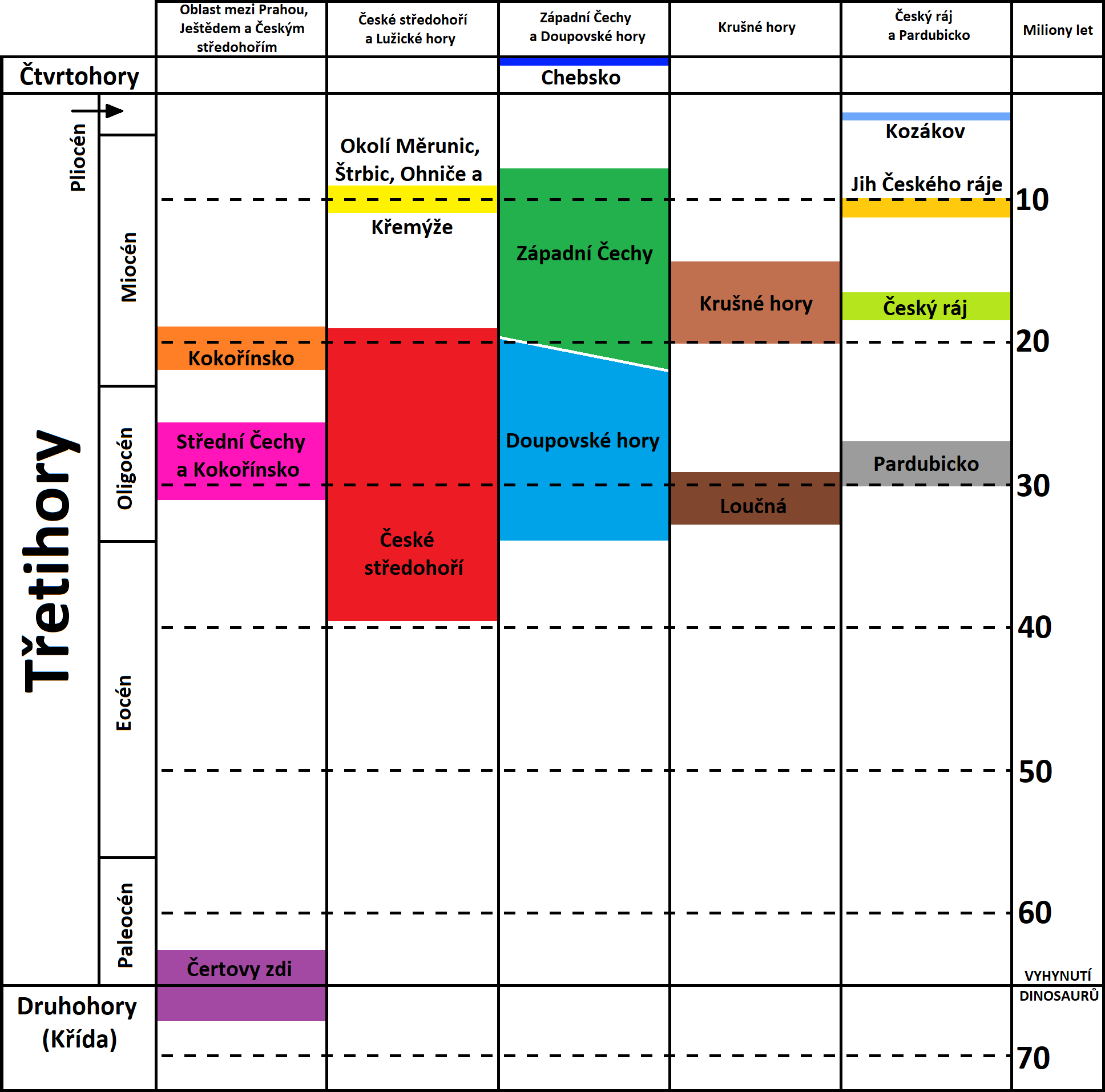 Historie.